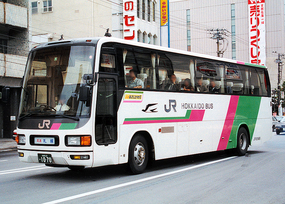 JR北海道 高速あさひかわ号 三菱ふそう・エアロクィーンM 744-0981